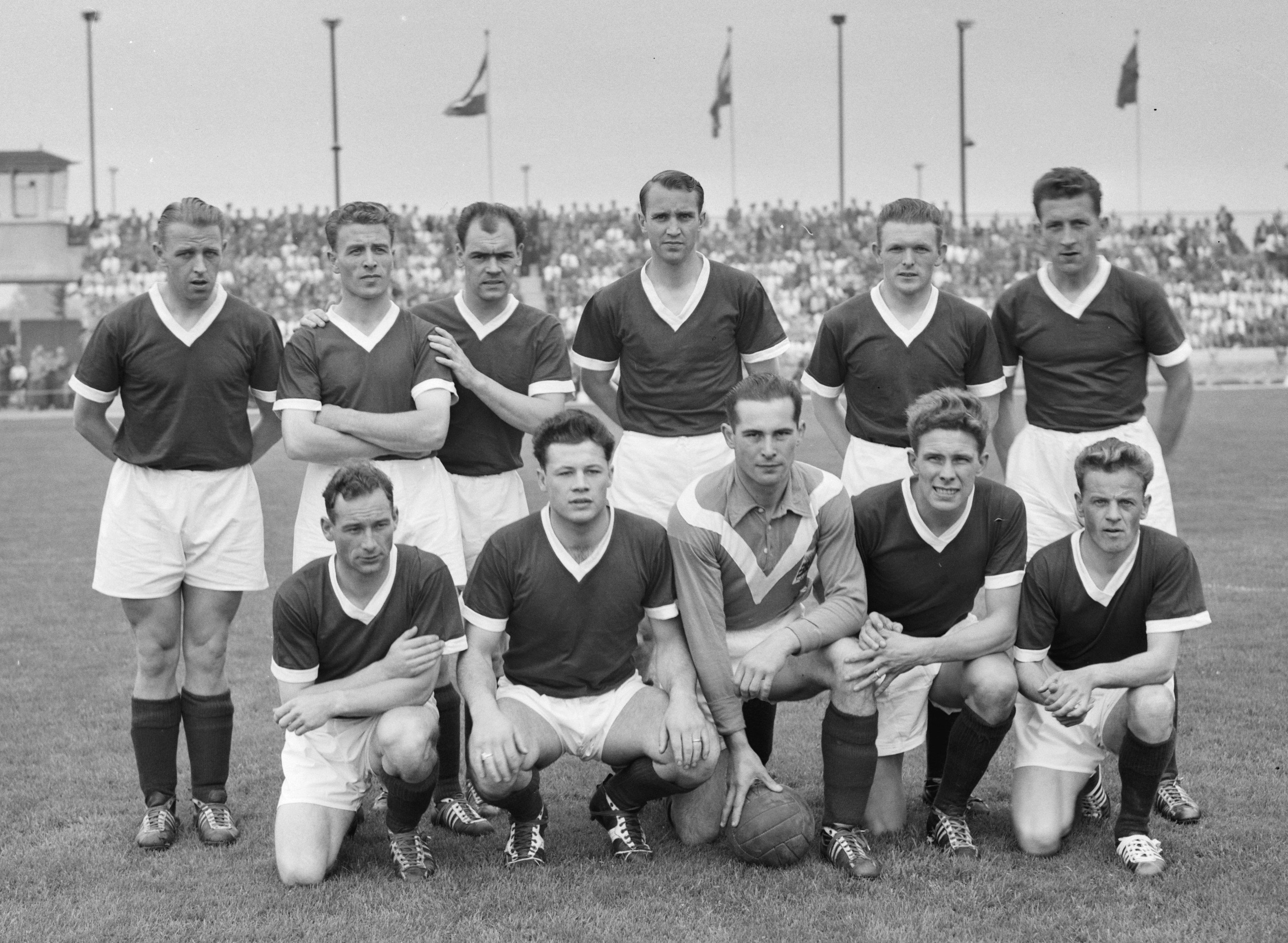 Rapid JC tegen Enschede. Rapid JC elftal.